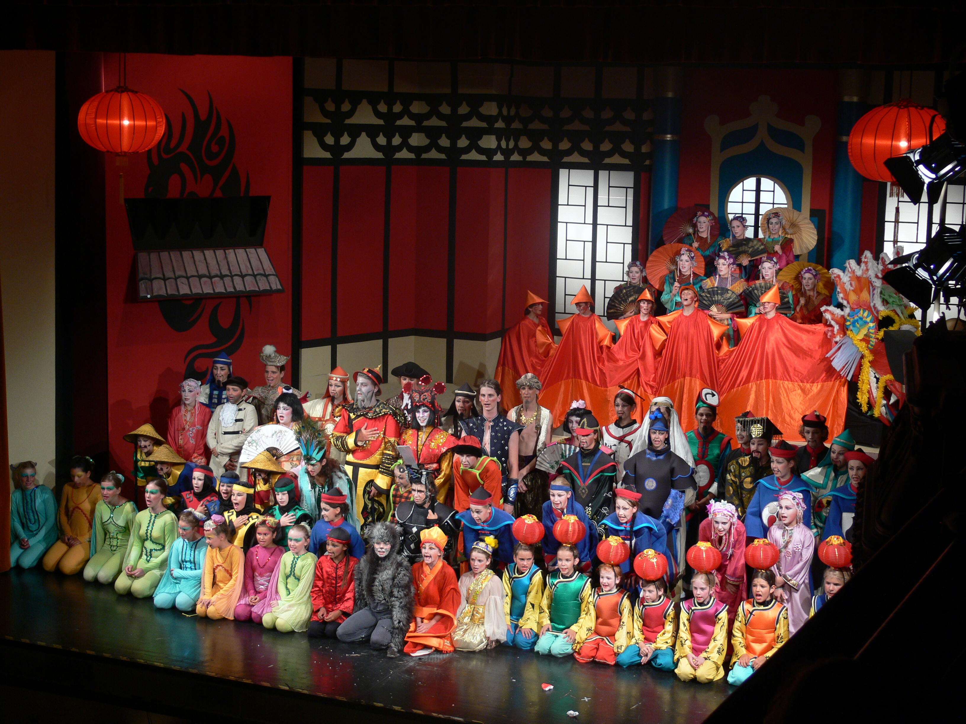 Nach dem Schluss der Aufführung "Prinzessin Turandot" wird die Ravensburger „Hymne“ „Mein Ravensburg im Schwabenland“ gesungen. Rutentheater am Rutenfest Ravensburg (Juli 2006), im Konzerthaus Ravensburg.